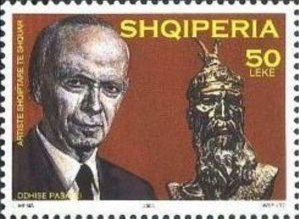 Odhise Paskali, Albanian sculptor